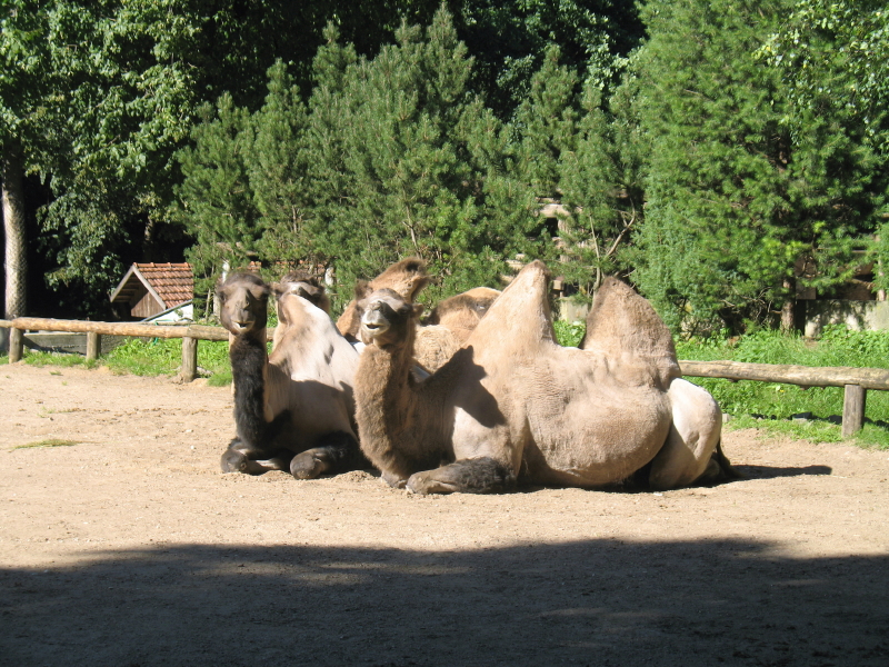 Lietuvos zoologijos sodas, Kaunas.